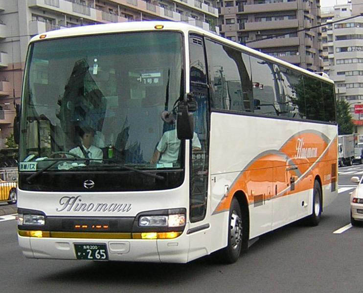 登録番号 鳥取200か・265 日の丸自動車所属 キャメル号用 2005年8月11日 品川バスセンターにて撮影